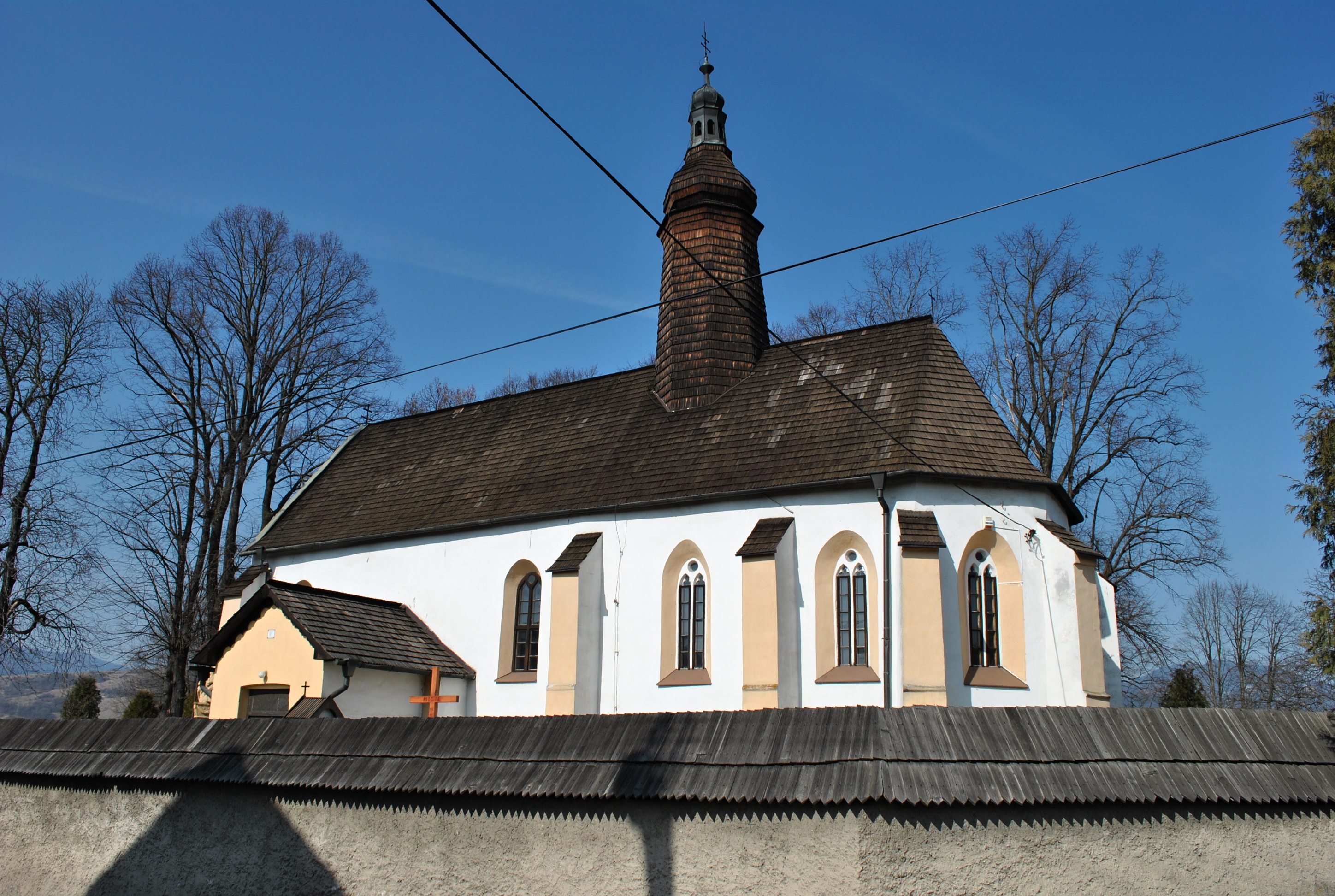 Kostol